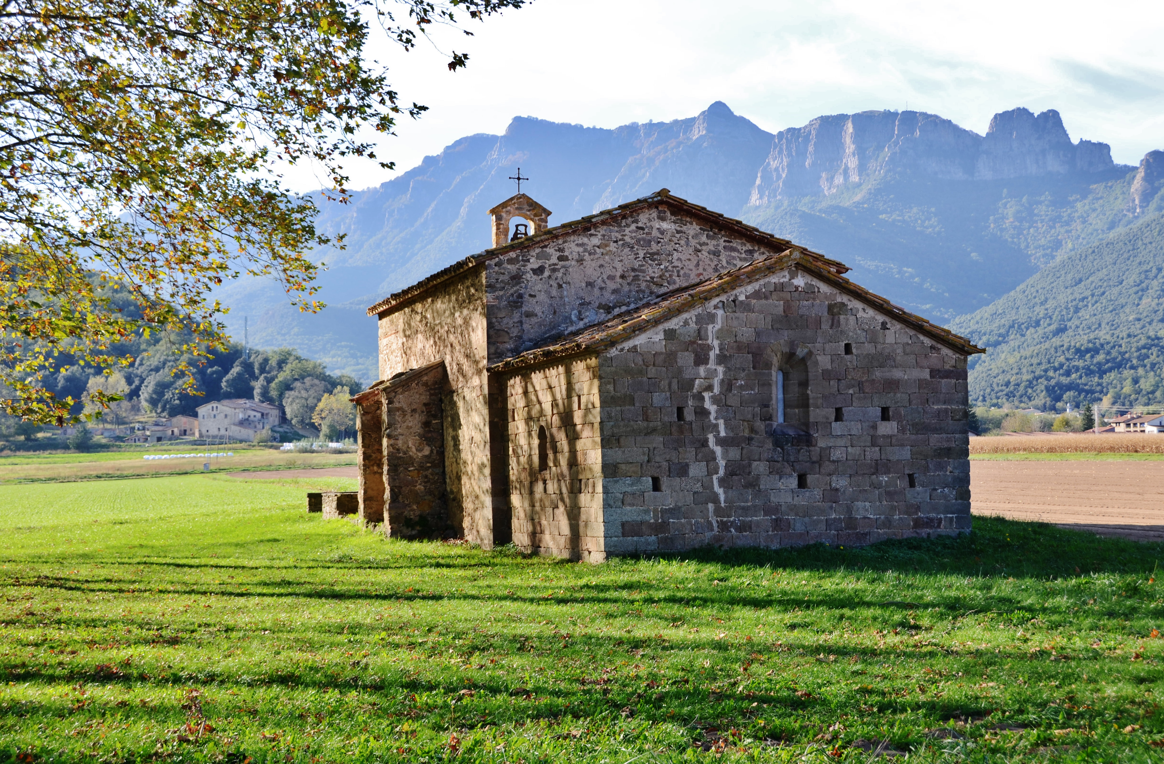 Ermita romànica de Sant Quintí, Sant Esteve d'En Bas, La Vall d'en Bas, Garrotxa